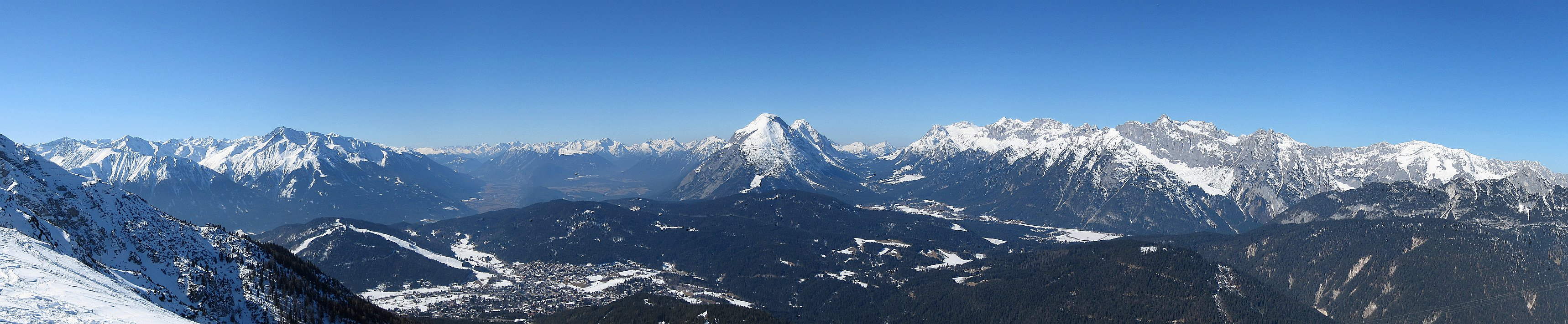 Rundblick vom Seefelder Joch nach Westen